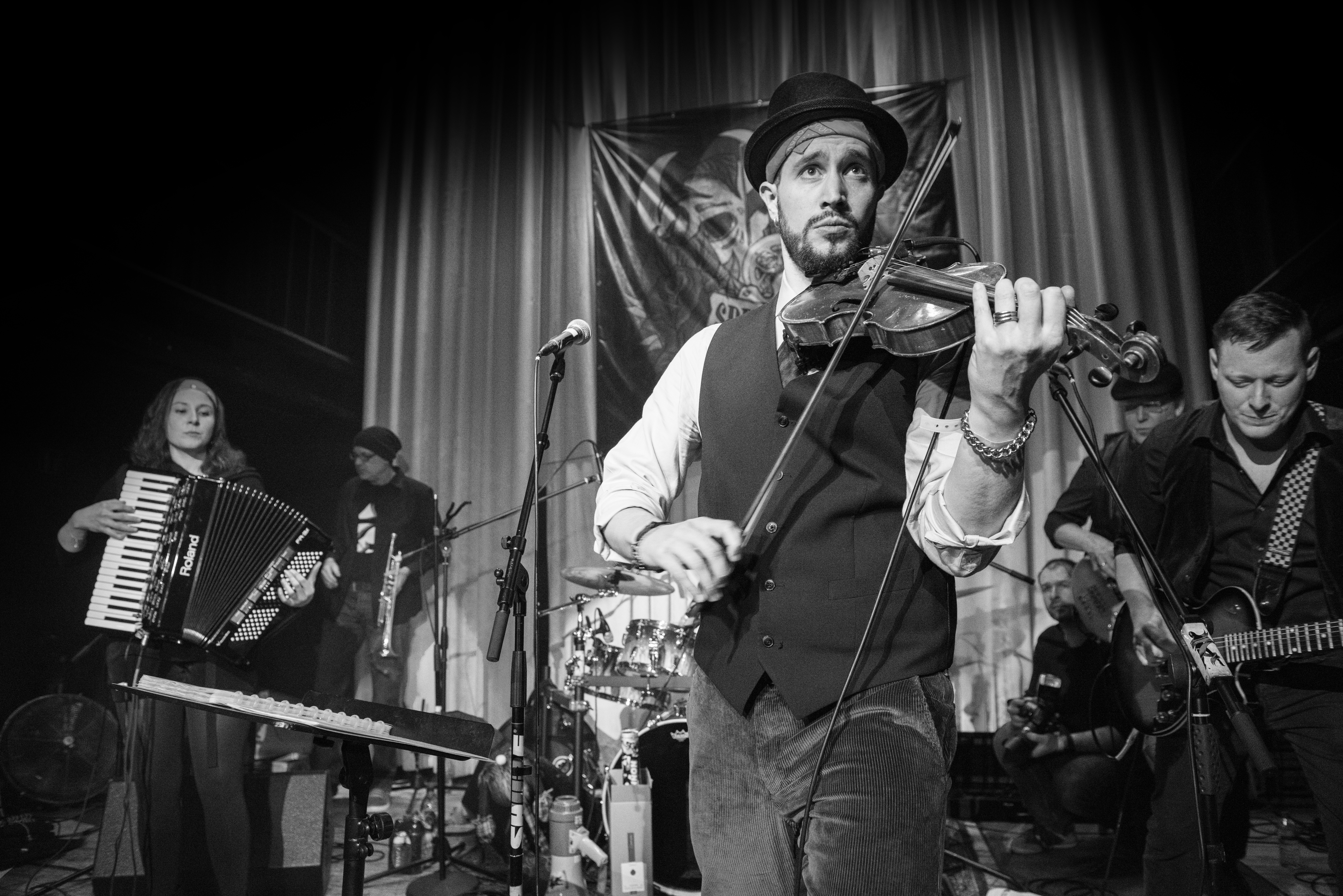 Schëppe Siwen 2016 am Melusina